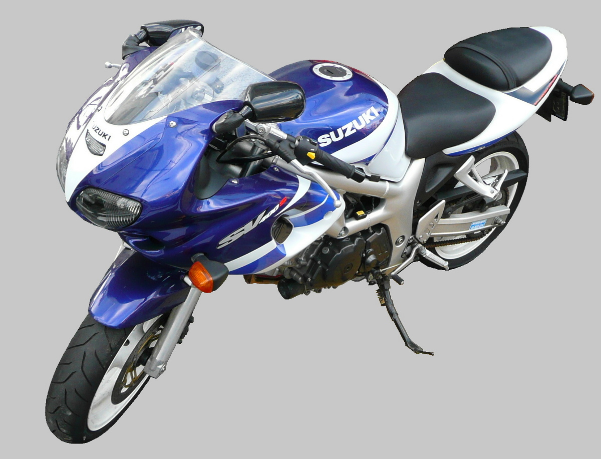 SUZUKI SV 400S